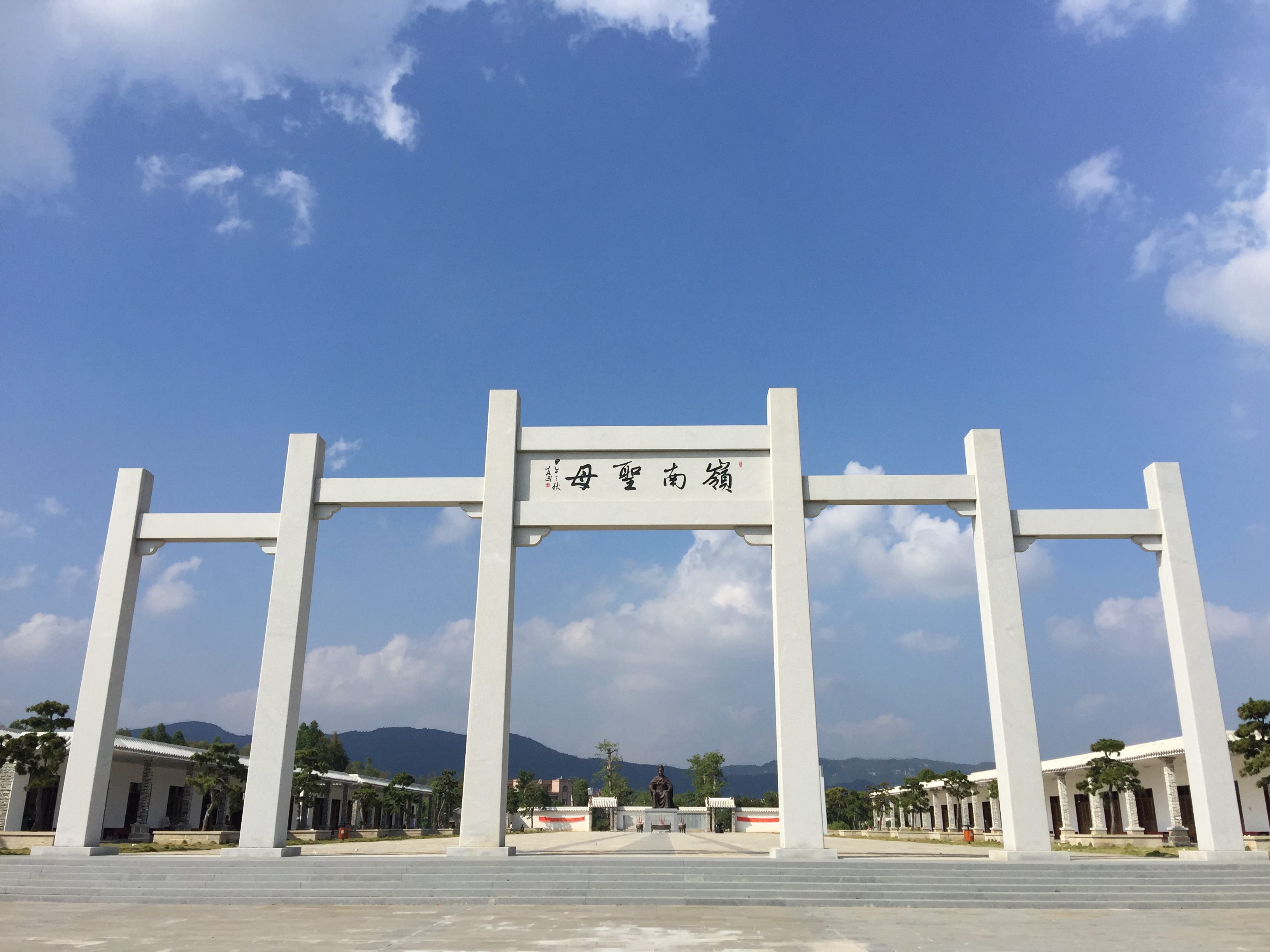 隋谯国夫人冼氏墓入口牌匾